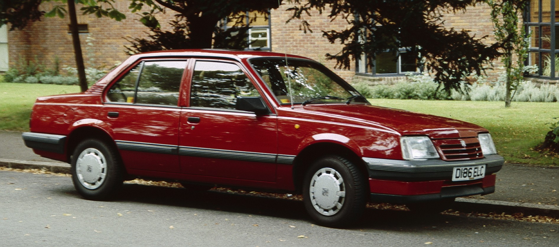 Vauxhall Cavalier (second generation)